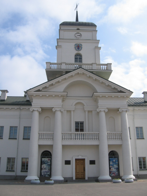 Минская ратуша, вид слева